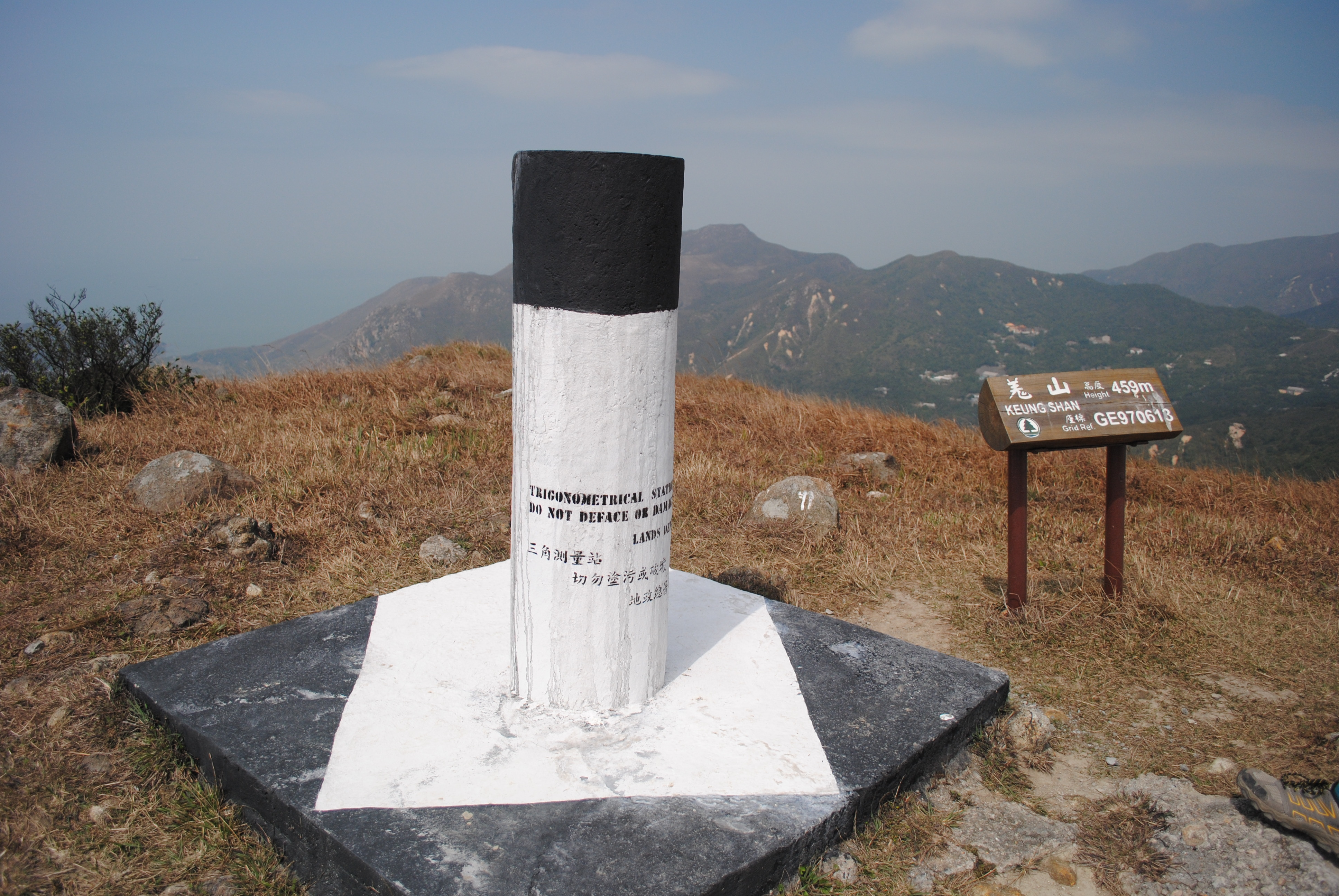 羗山山頂